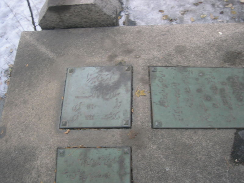 Tombe de Zahir Iraj